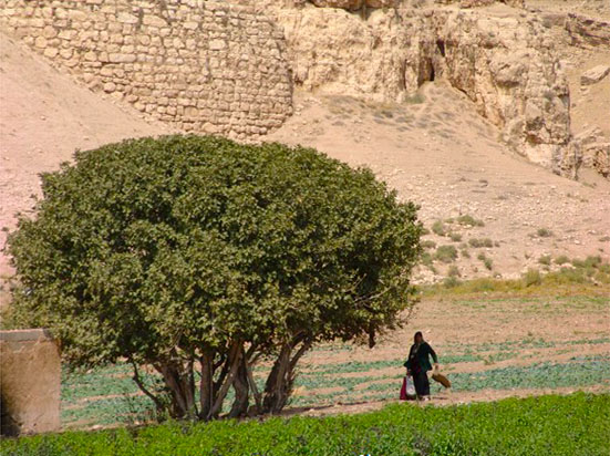 تصاویری از قصر ابونصر